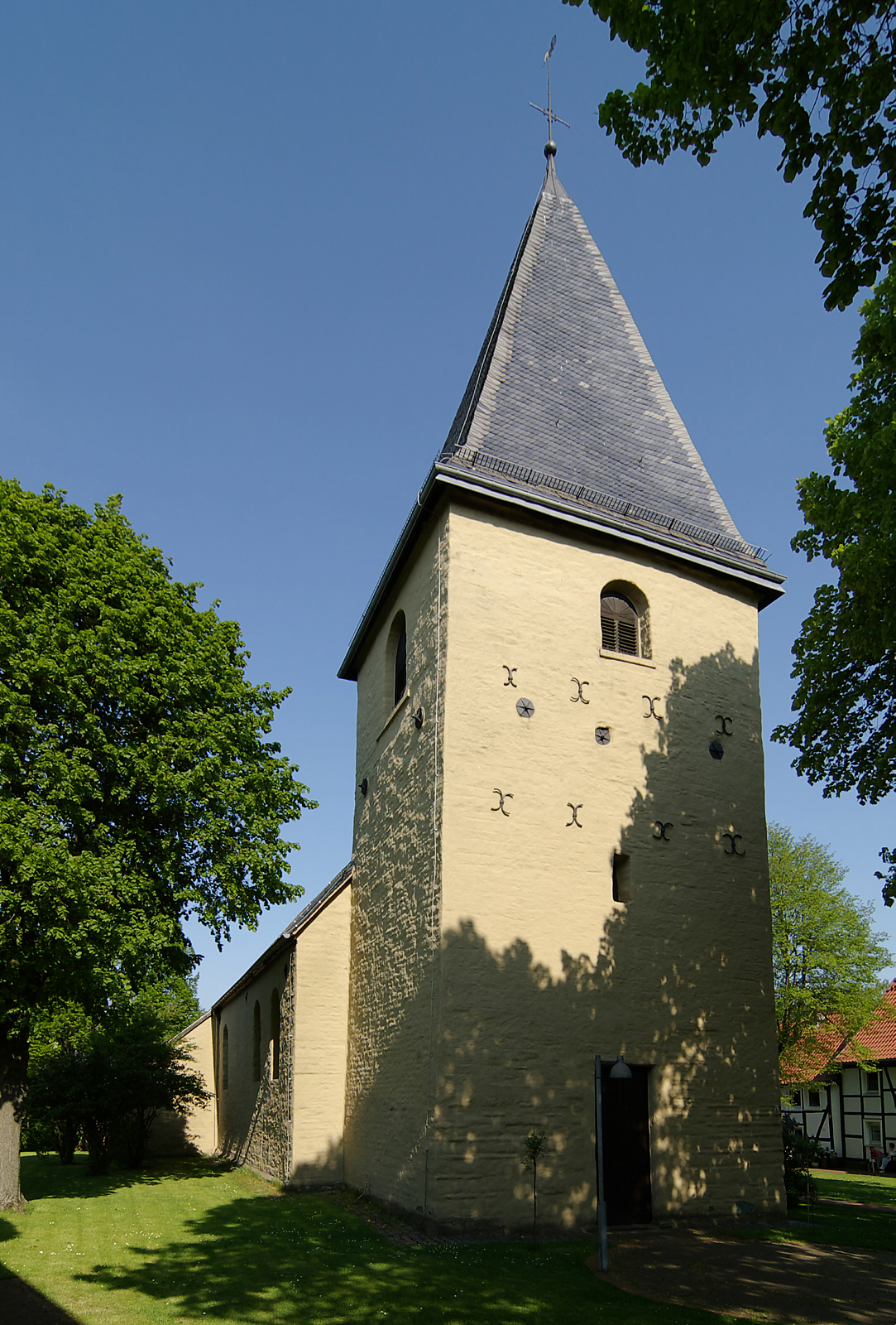 Dorfkirche in Flierich, Gemeinde Bönen, Fliericher Kirchplatz 9, Baudenkmalnummer 18